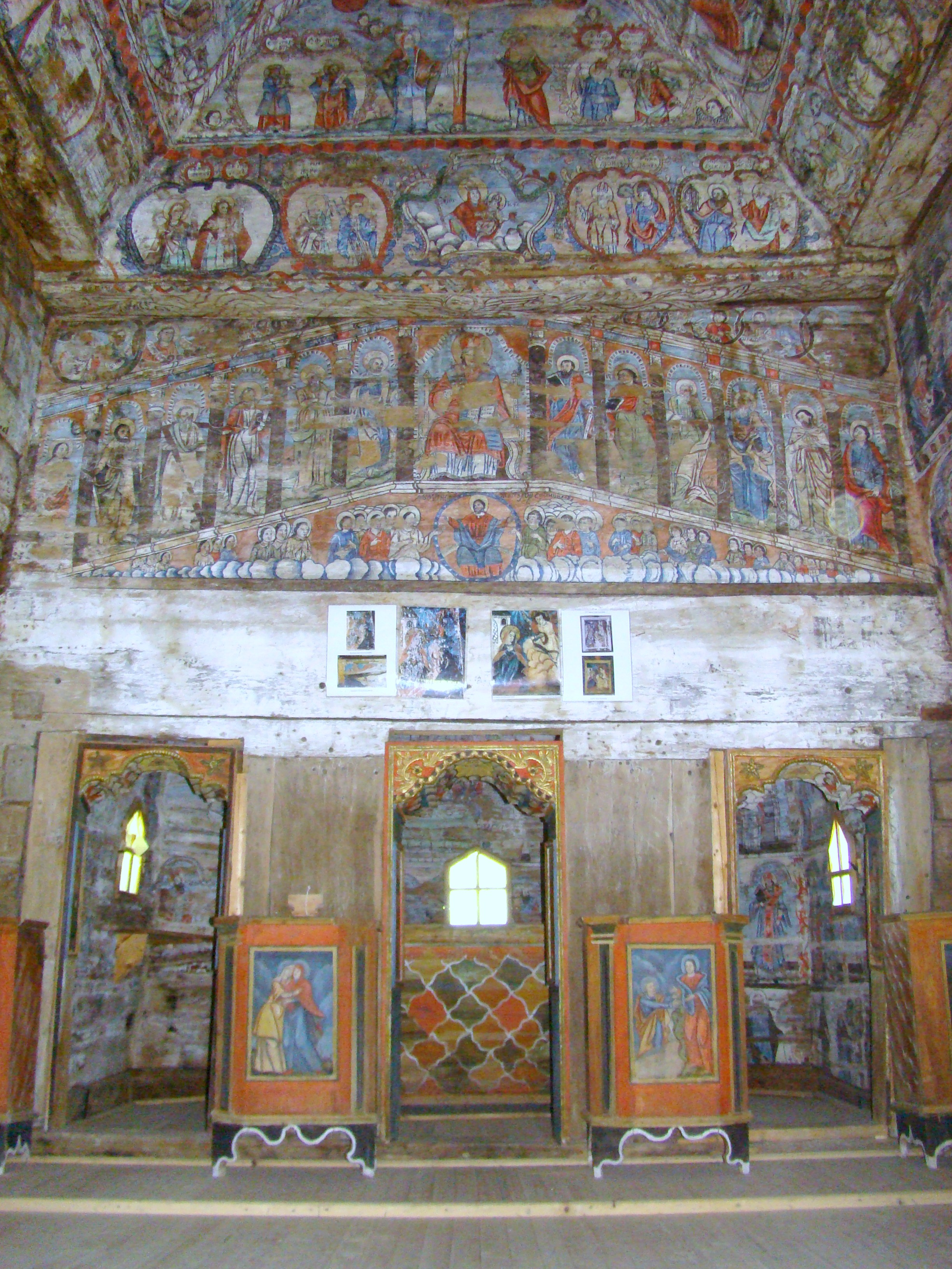 Biserica de lemn "Intrarea Maicii Domnului în Biserică" , sat BÂRSANA